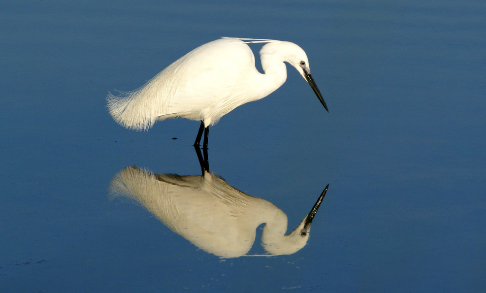 Le reflet parfait d'une aigrette garzette (oiseau), sur l'Étang du Bagnas, (Agde, Hérault).